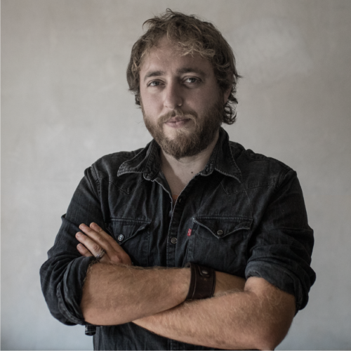 El fotoperiodista Santi Palacios antes de ofrecer una conferencia TEDx en Patras, Grecia, octubre de 2018.